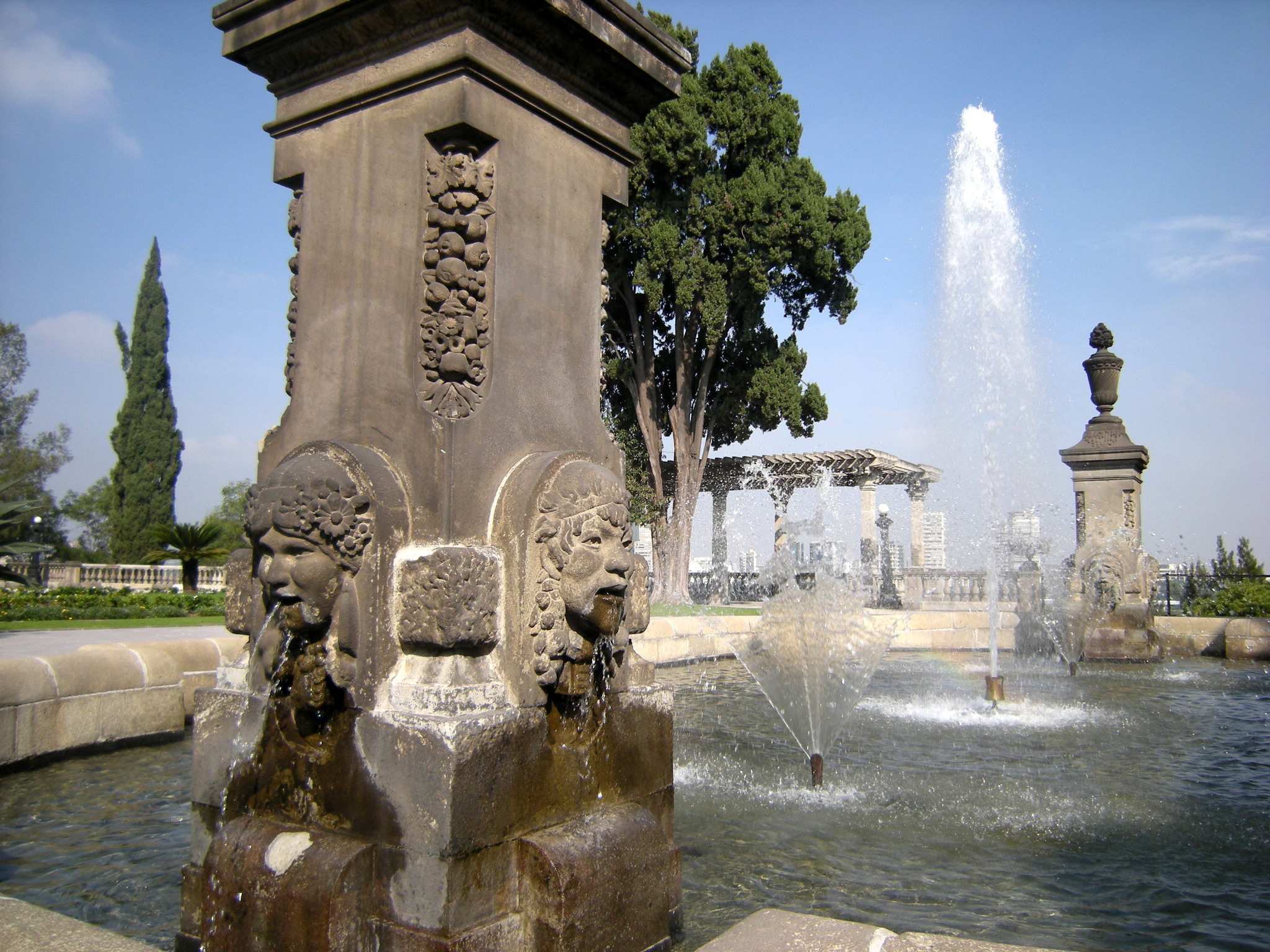 Cidade do México